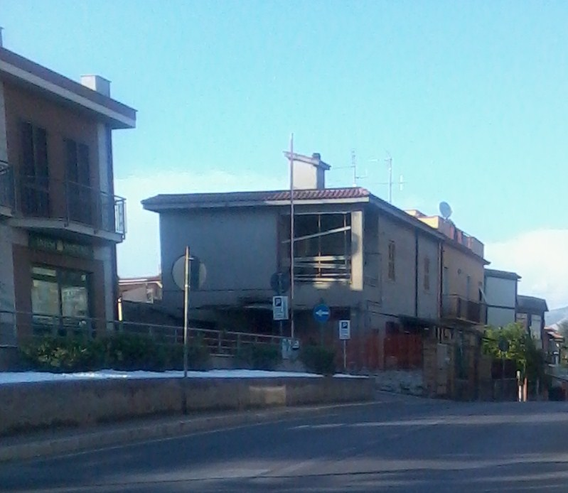 Il quartiere Franceschetti a Cisterna